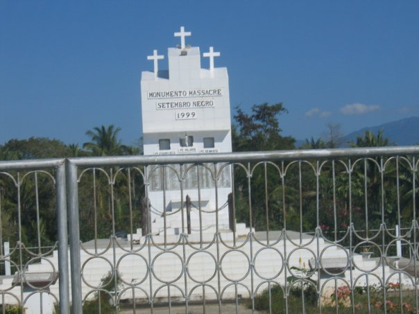 Mahnmal für die Opfer des Schwarzen Septembers 1999